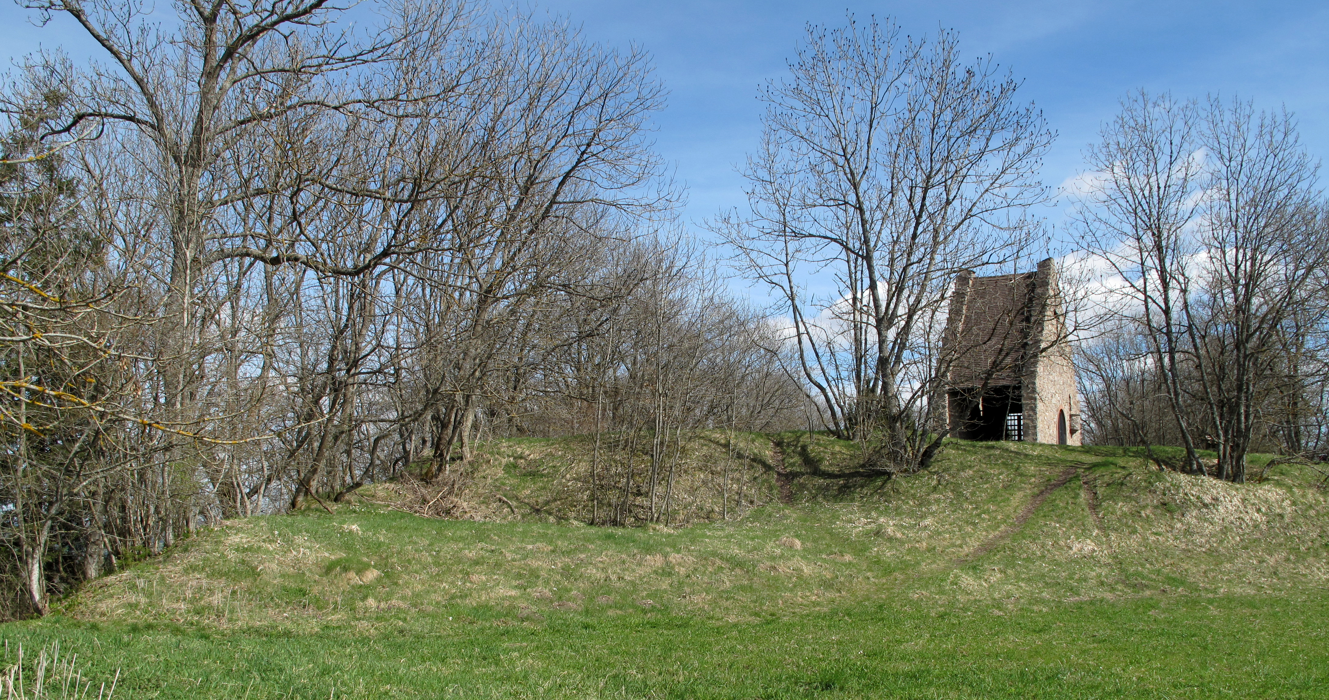 Burgareal an der Nordwestecke des Fürstenberg.